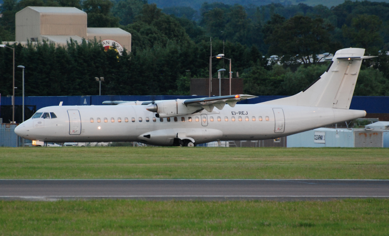 An Aer Arann ATR 72-201 at EGPH.